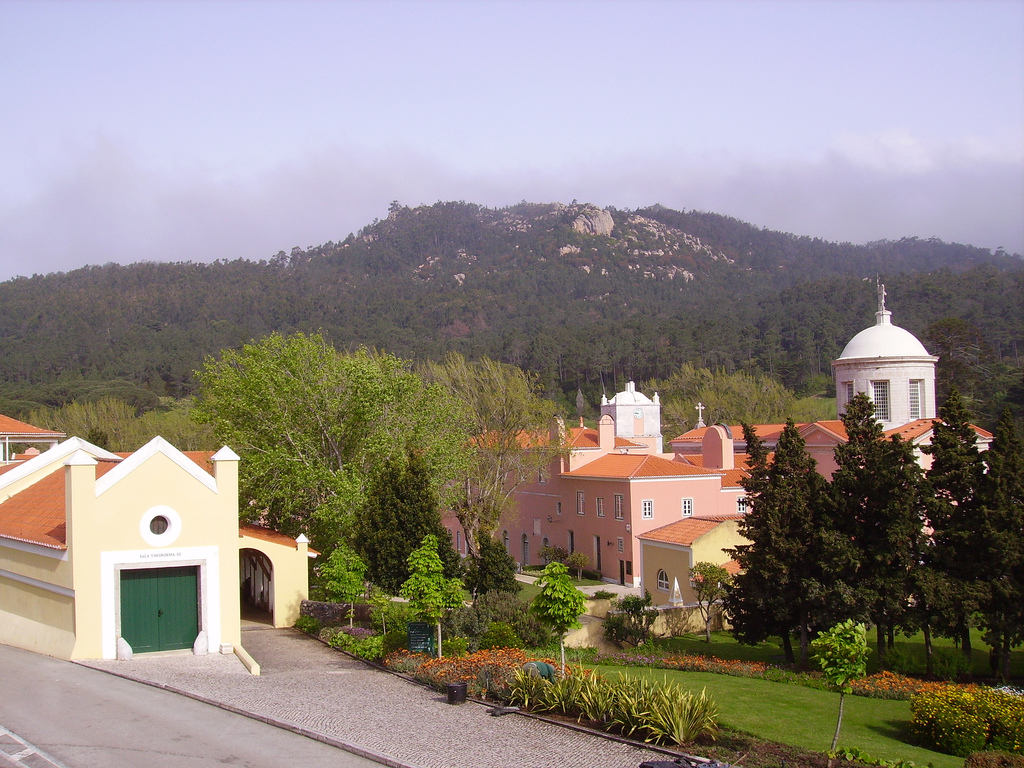 superbe endroit pour se détendre et jouer au golf près d' Estoril au Portugal very green